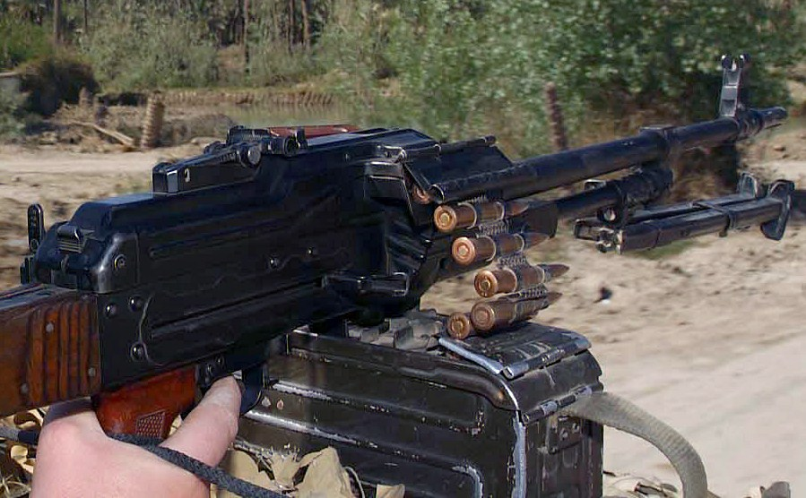 7.62 mm PKM light machine gun